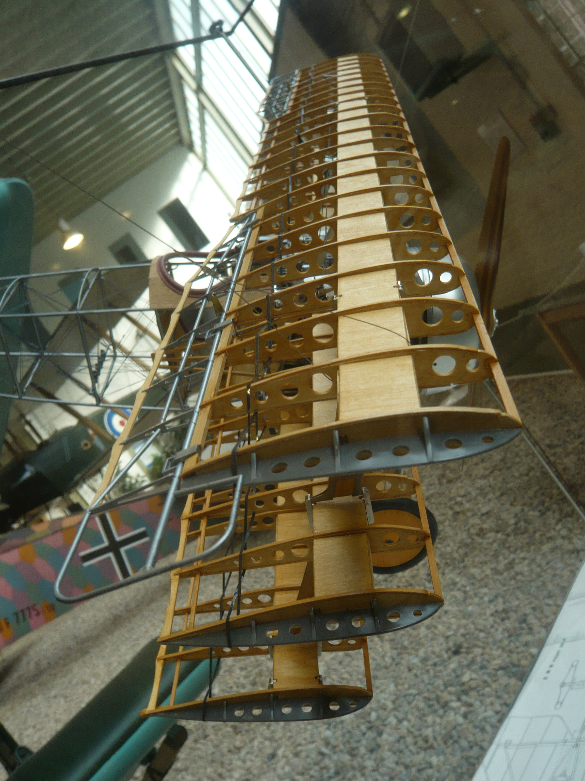 Fokker Dr.1 model close-up